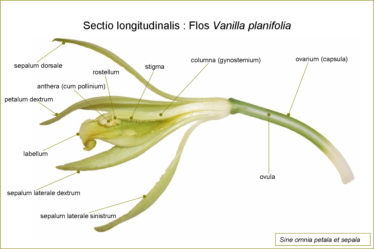 Photo & caption : B.navez - JAN 2006